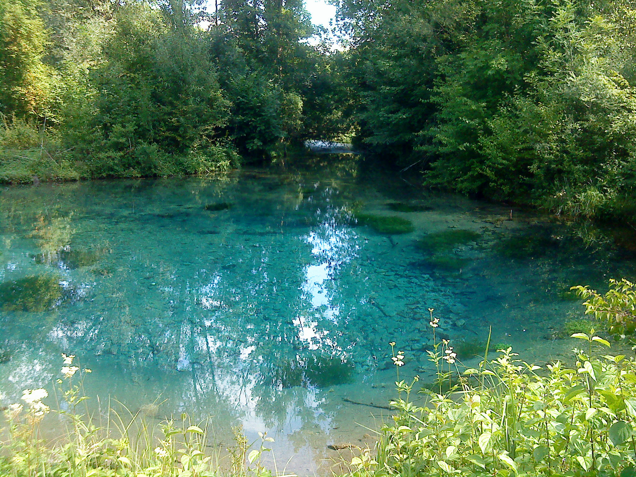 Die Kesselqueelle in Zwiefalten, Schwäbische Alb.